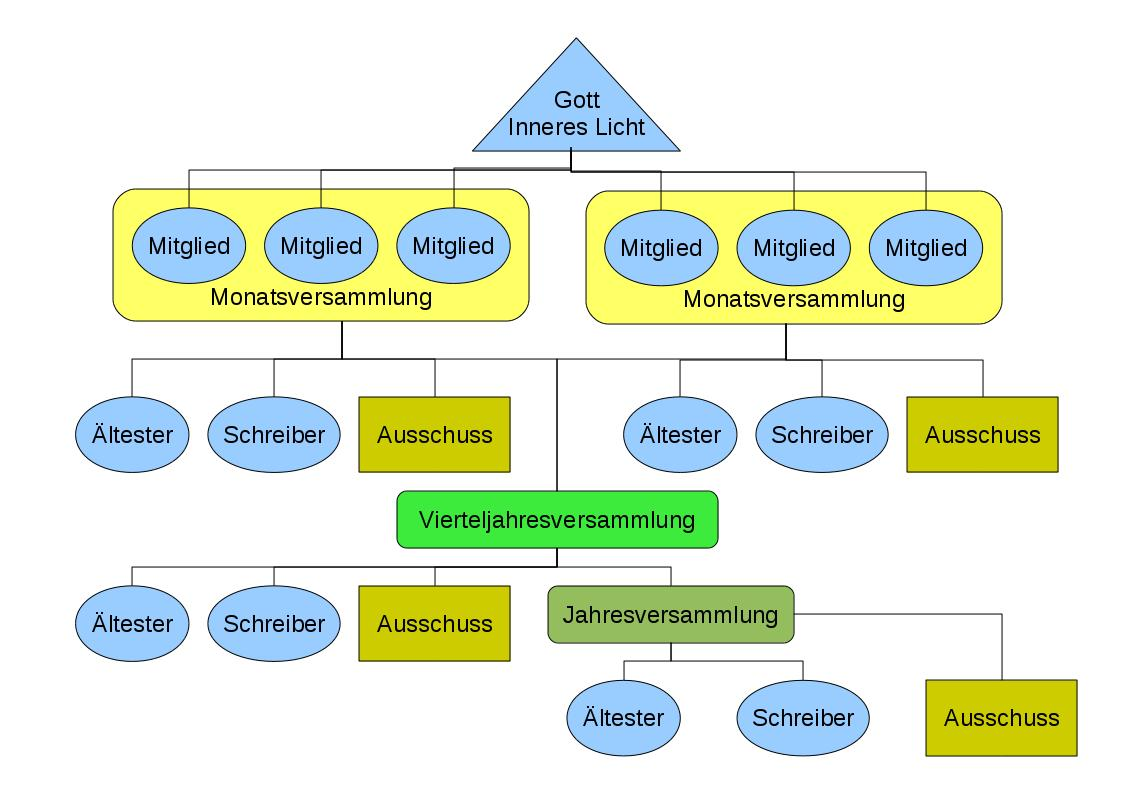 Schematische Darstellung der Gemeideleitung und Entscheidungsfindung im Quakertum (Konservativ und Liberal).